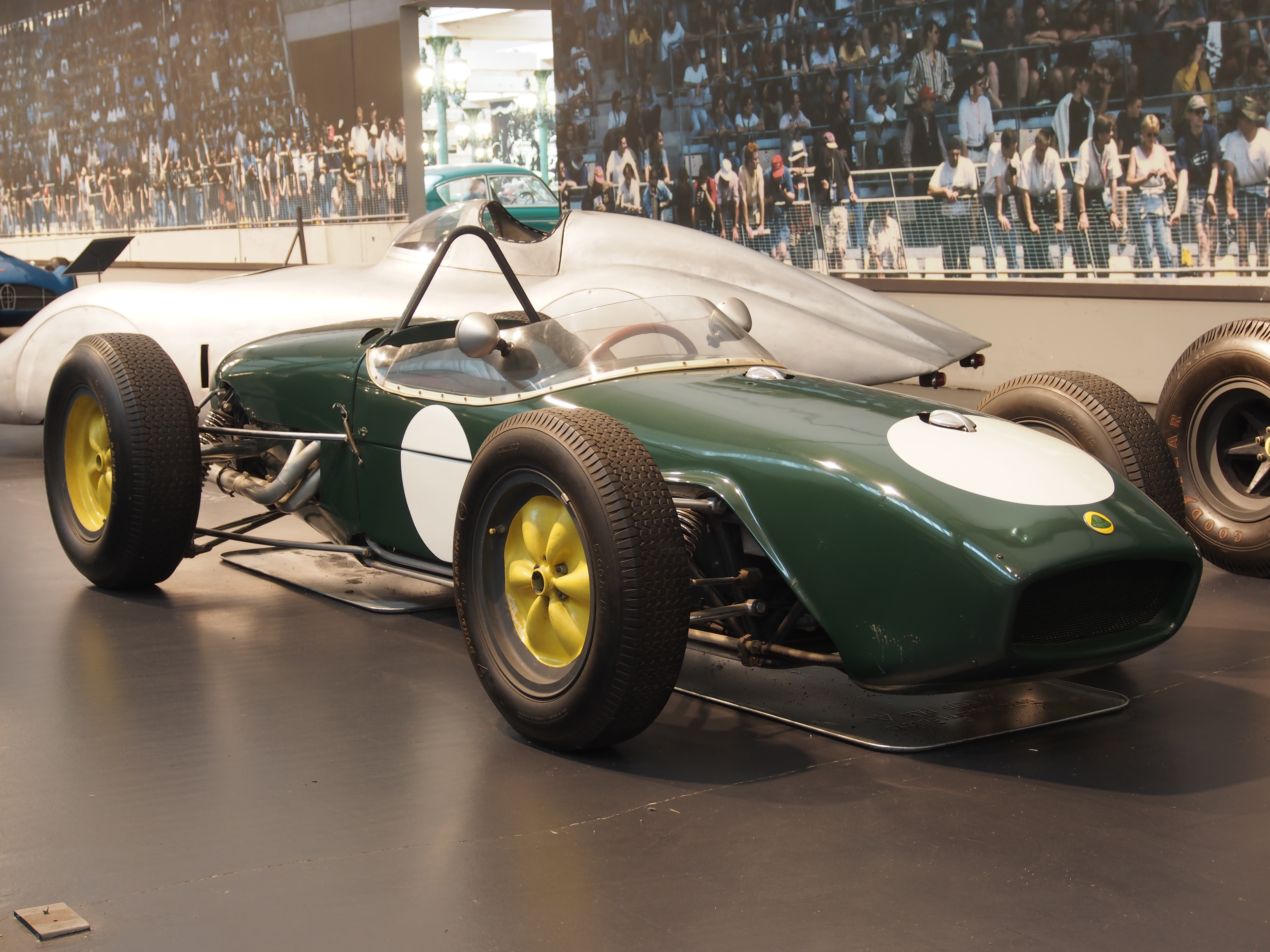 Photographed at the Cité de l’Automobile, Musée national de l’automobile, Collection Schlumpf, Mulhouse, France.